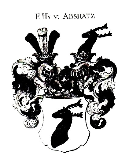 Wappen Freiherren von Abschatz